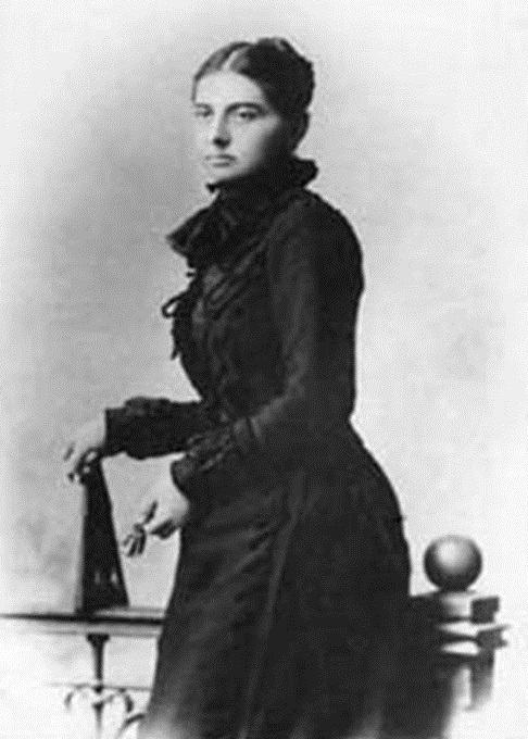 nemesnépi Marthon Róza (1855–1933)